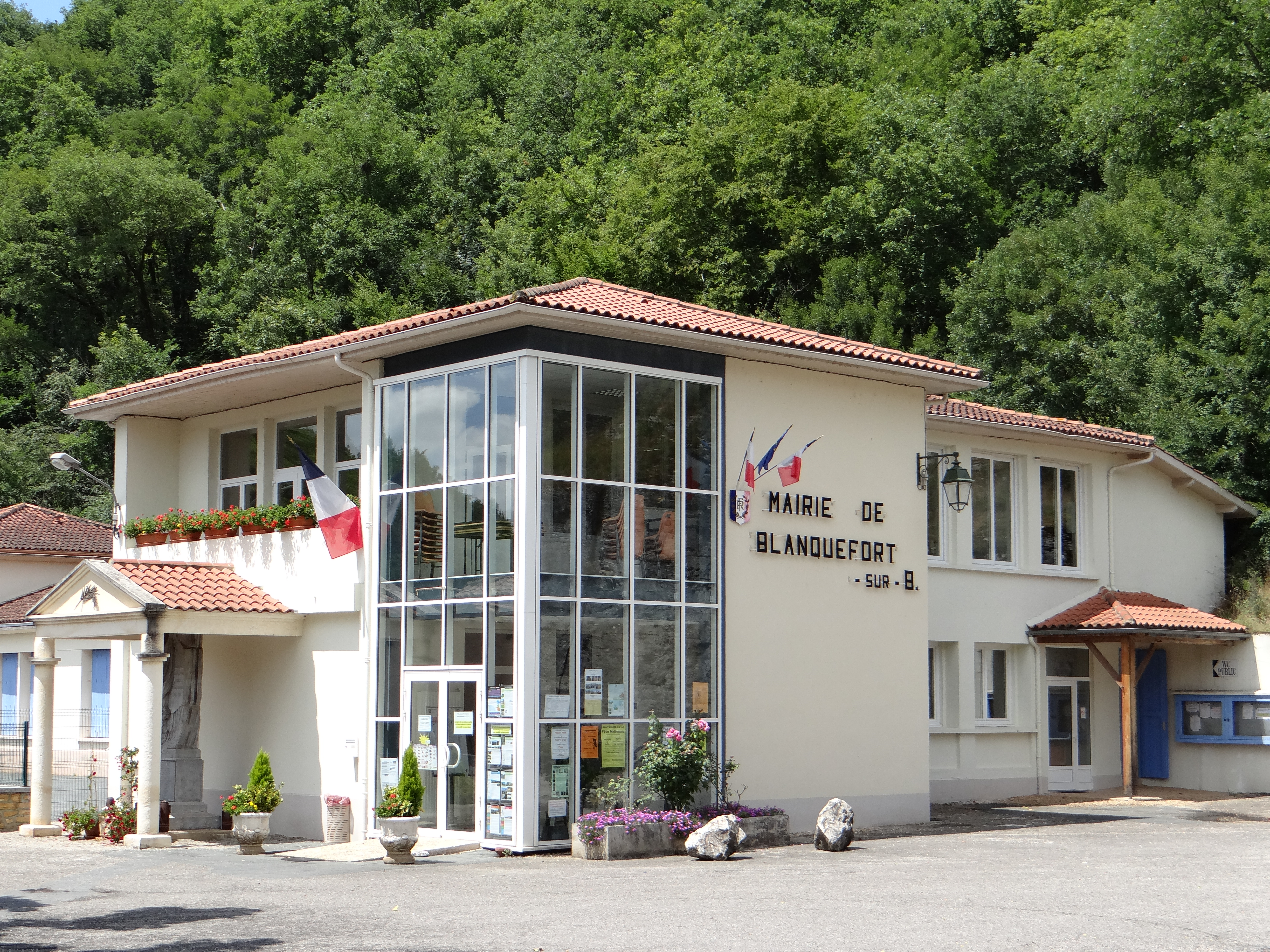 Blanquefort-sur-Briolance - Mairie